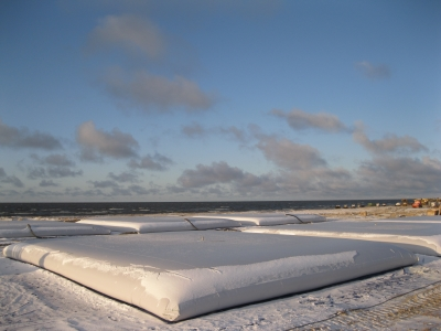 нефтетанк